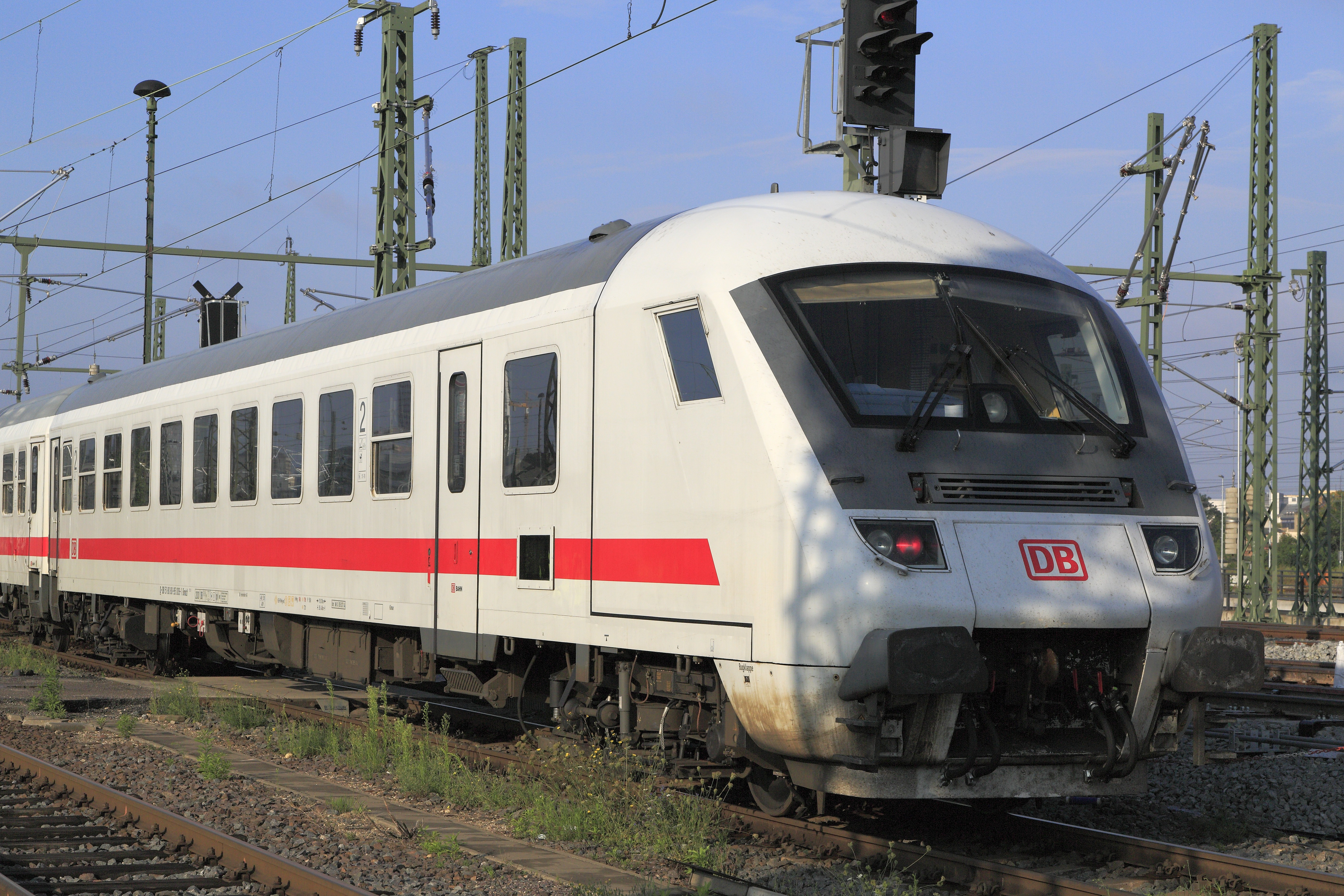 Steuerwagen eines IC-Wendezuges bei der Fahrt von der Abstellgruppe Berliner Bahnhof zum Bahnsteig. Die von vornherein für den IC-Betrieb gebauten Steuerwagen in IR-Bauart sind an der fehlenden unteren Bugklappe zu erkennen.